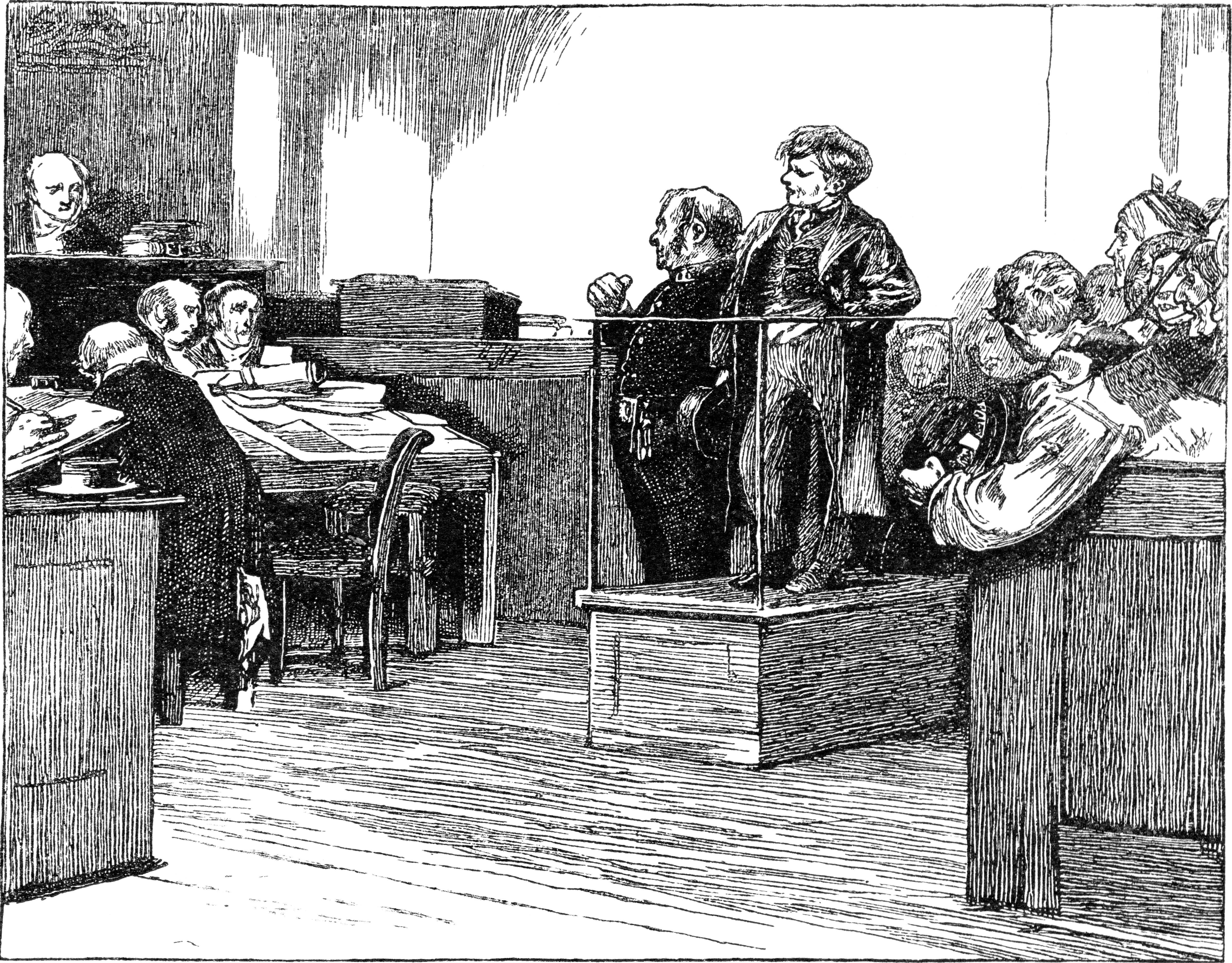 Illustration på sida 217 ur boken Oliver Twist: Samhällsroman från 1898